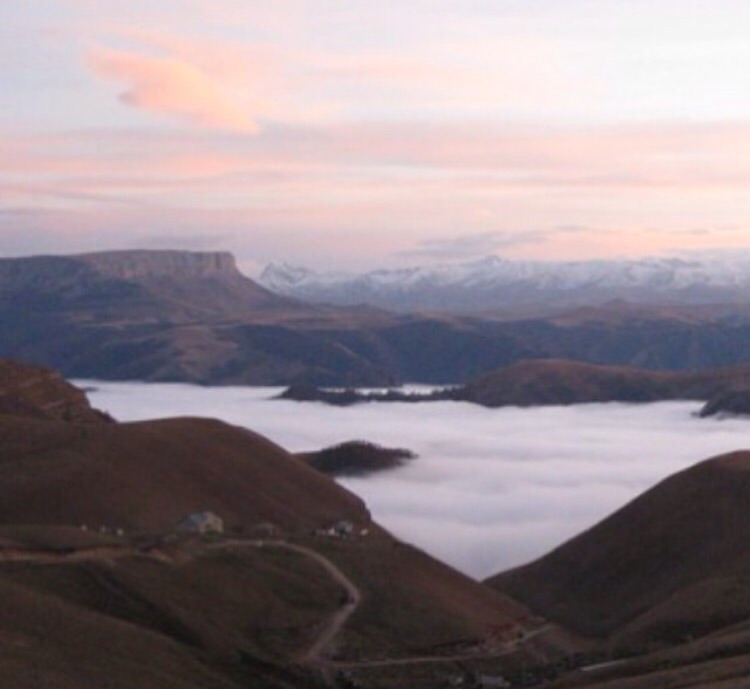 Выходы минеральных источников Кичи-Балыкские, Малокарачаевский район This image is related to the protected area of Russia number 0910045